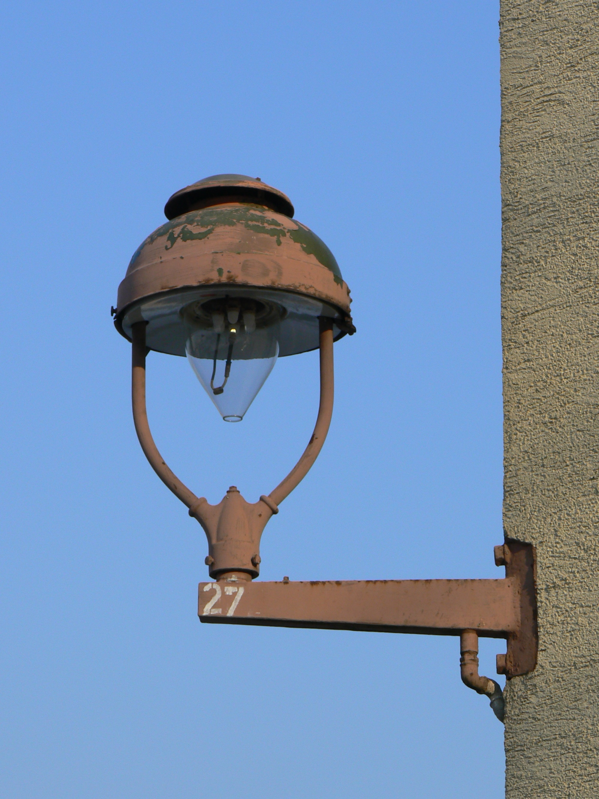 Frankfurt Bockenheim Gaslaterne 10.jpg